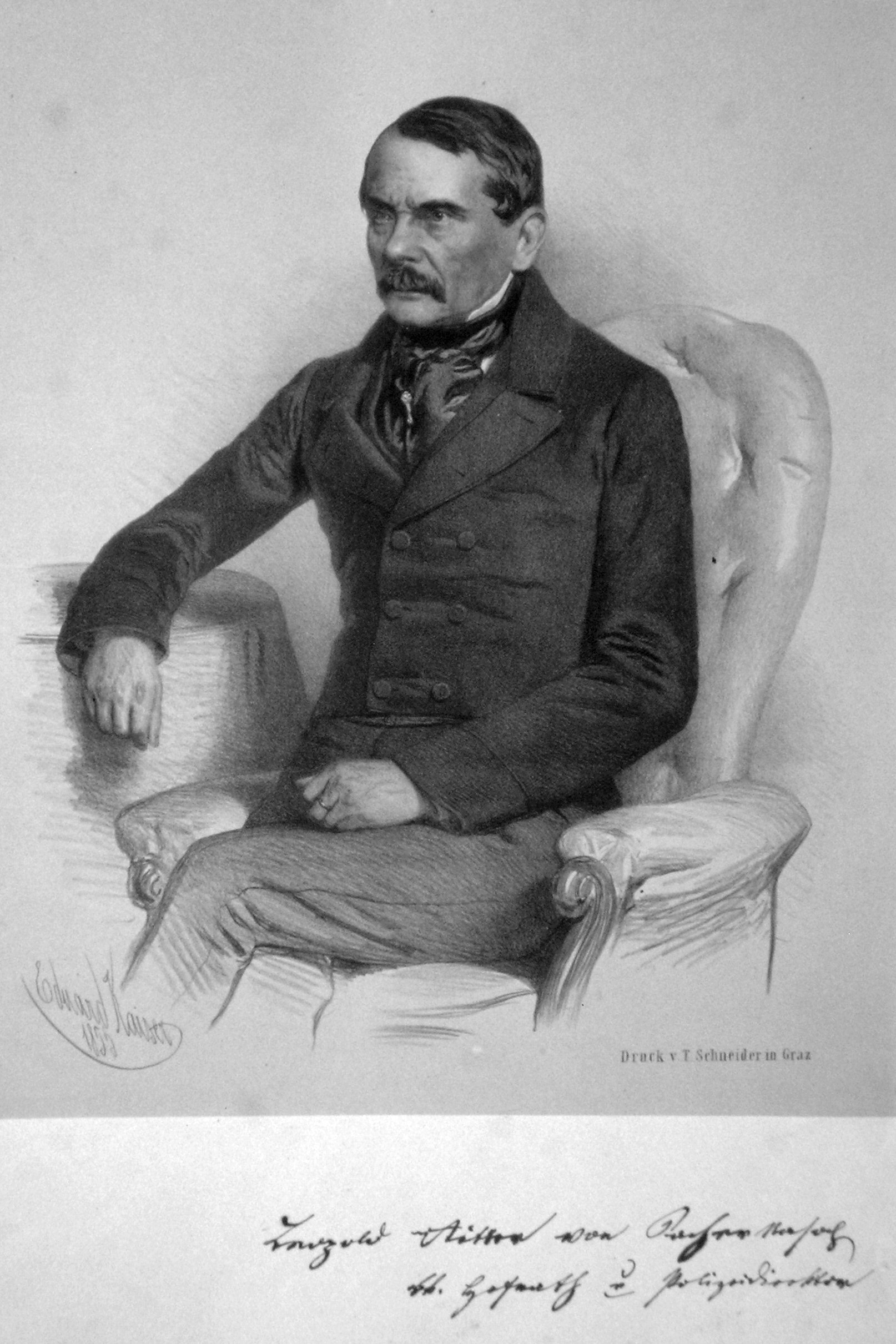 Leopold von Sacher (1797-1874), Lithographie von Eduard Kaiser aus dem Jahre 1855